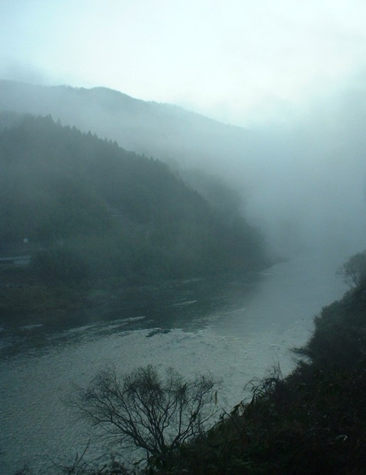 木津川。関西本線・加茂～笠置間の車内より撮影。